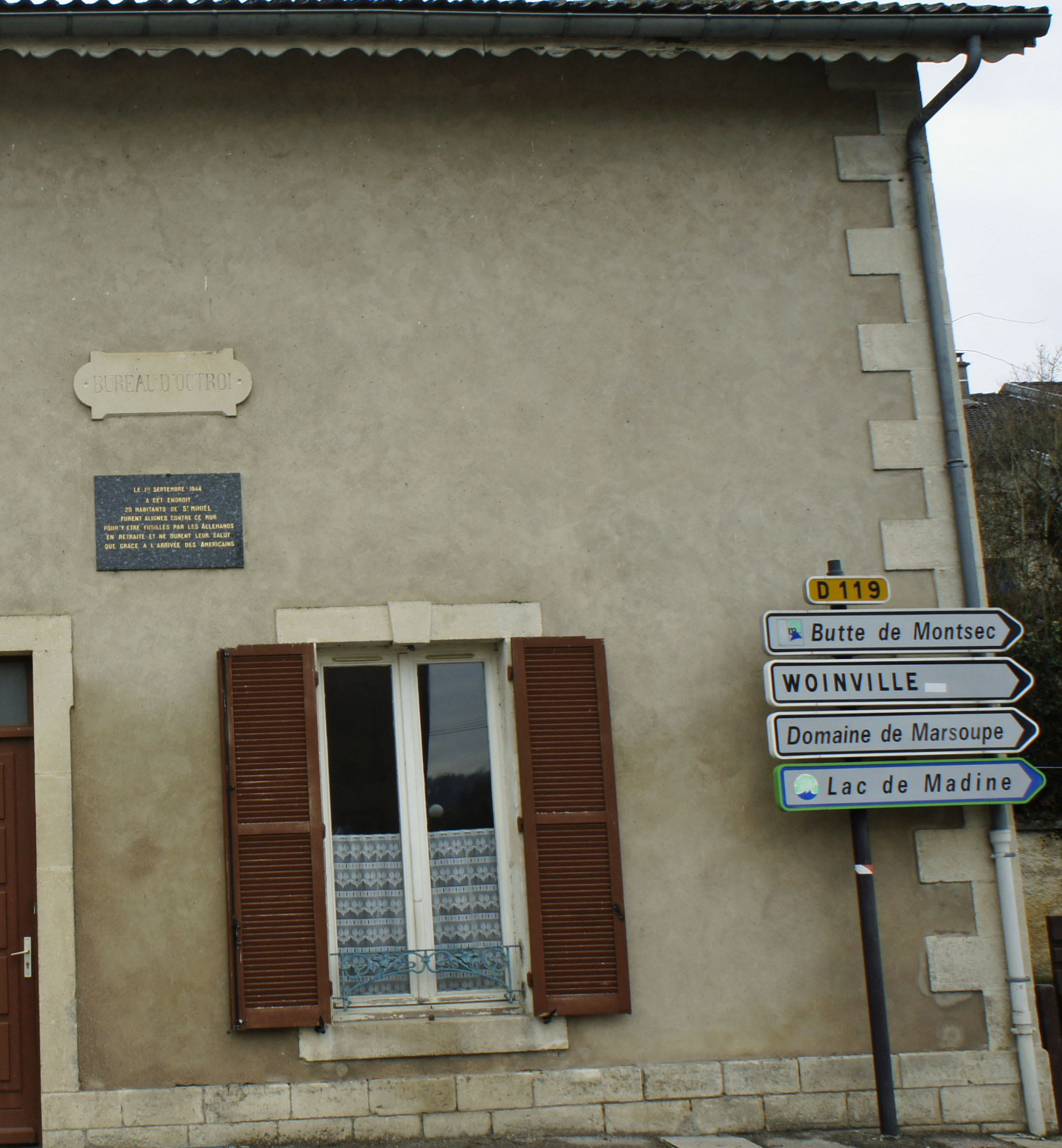 Ancien bureau d'octroi route de Woinville ayant comme plaque Le 1er septembre 1944 a cet endroit 20 habitants de St-Mihiel furent alignés contre ce mur pour y etre fusillés par les Allemands en retraite et ne durent leur salut que grace a l'arrivée des Americains et gravé sur la façade Bureau d'octroi.